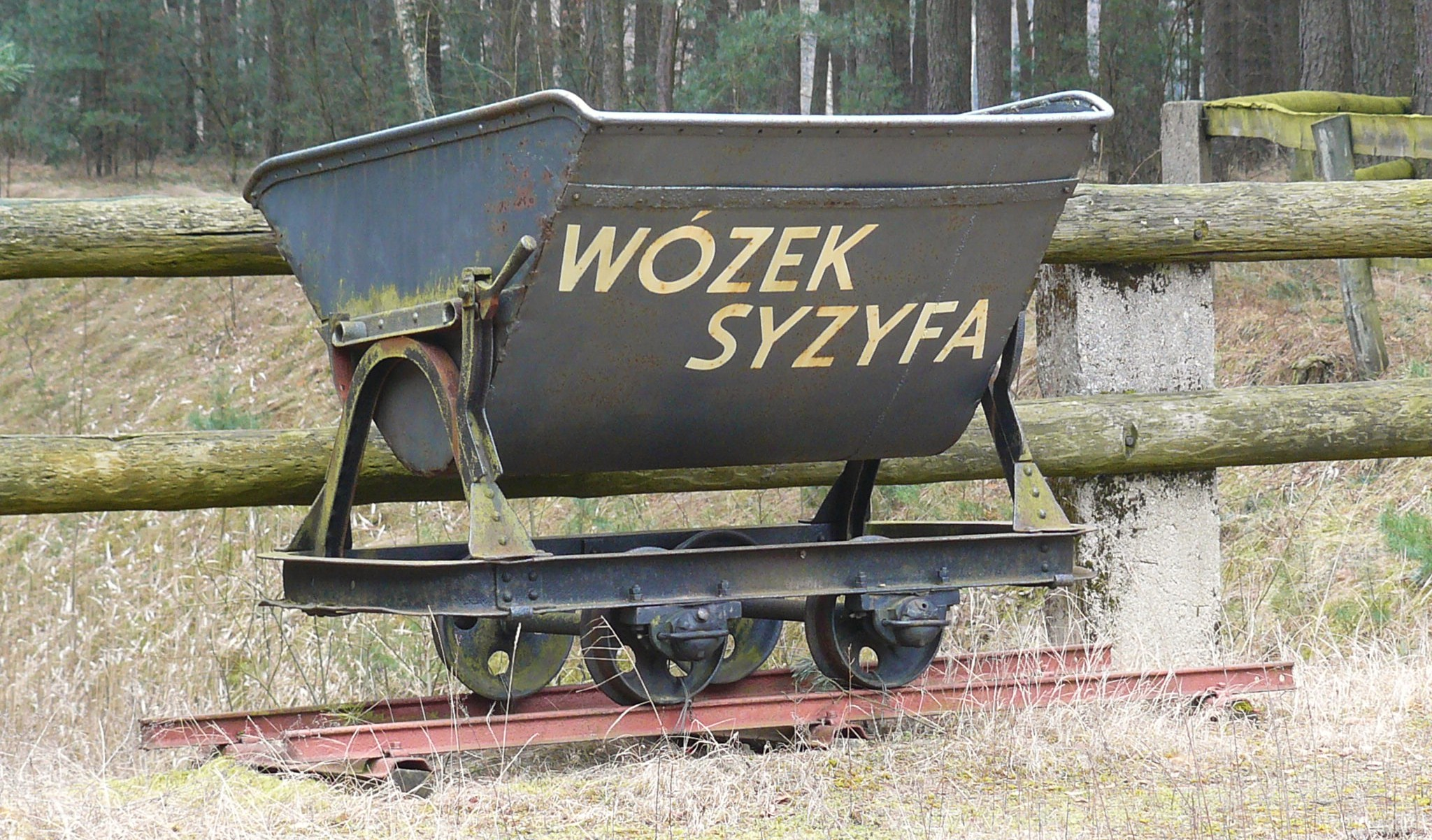 Tzw. Rów Syzyfa w Mężyku - Puszcza Notecka. Wykopany ręcznie przez Pawła Jechalika. Ukończony w 1999.